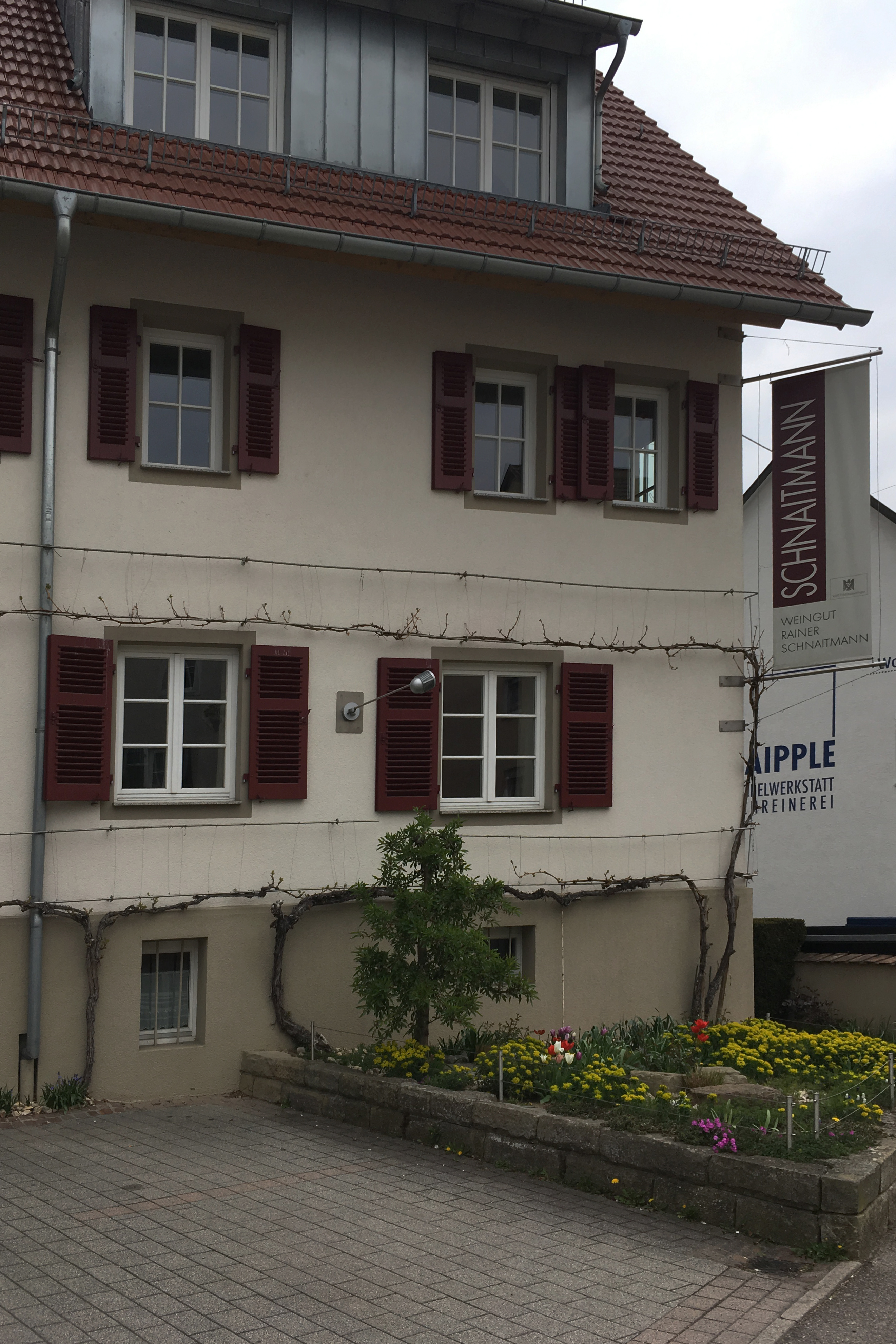 Gebäude des Weinguts Schnaitmann in Fellbach.